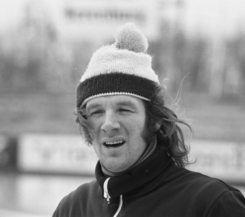 Hans van Helden traint op Thialfkunstijsbaan te Heerenveen Hans van Helden (kop)